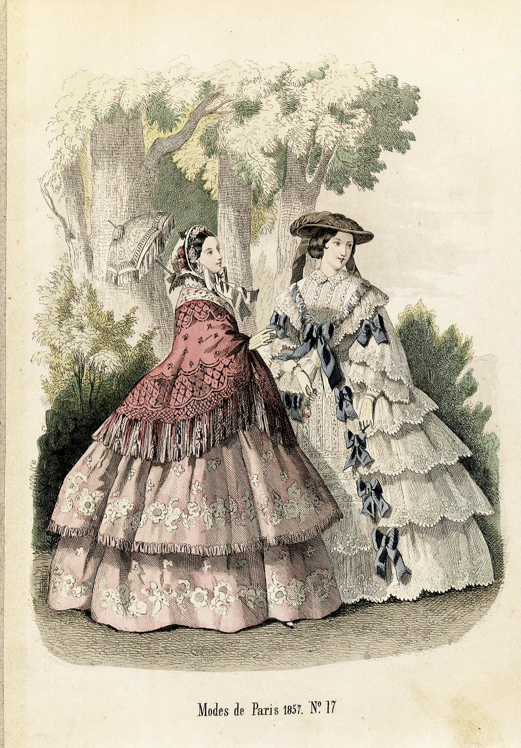 Klänning; Hatt; Fjädrar; Band; Parasoll; Mantilj; Blommor